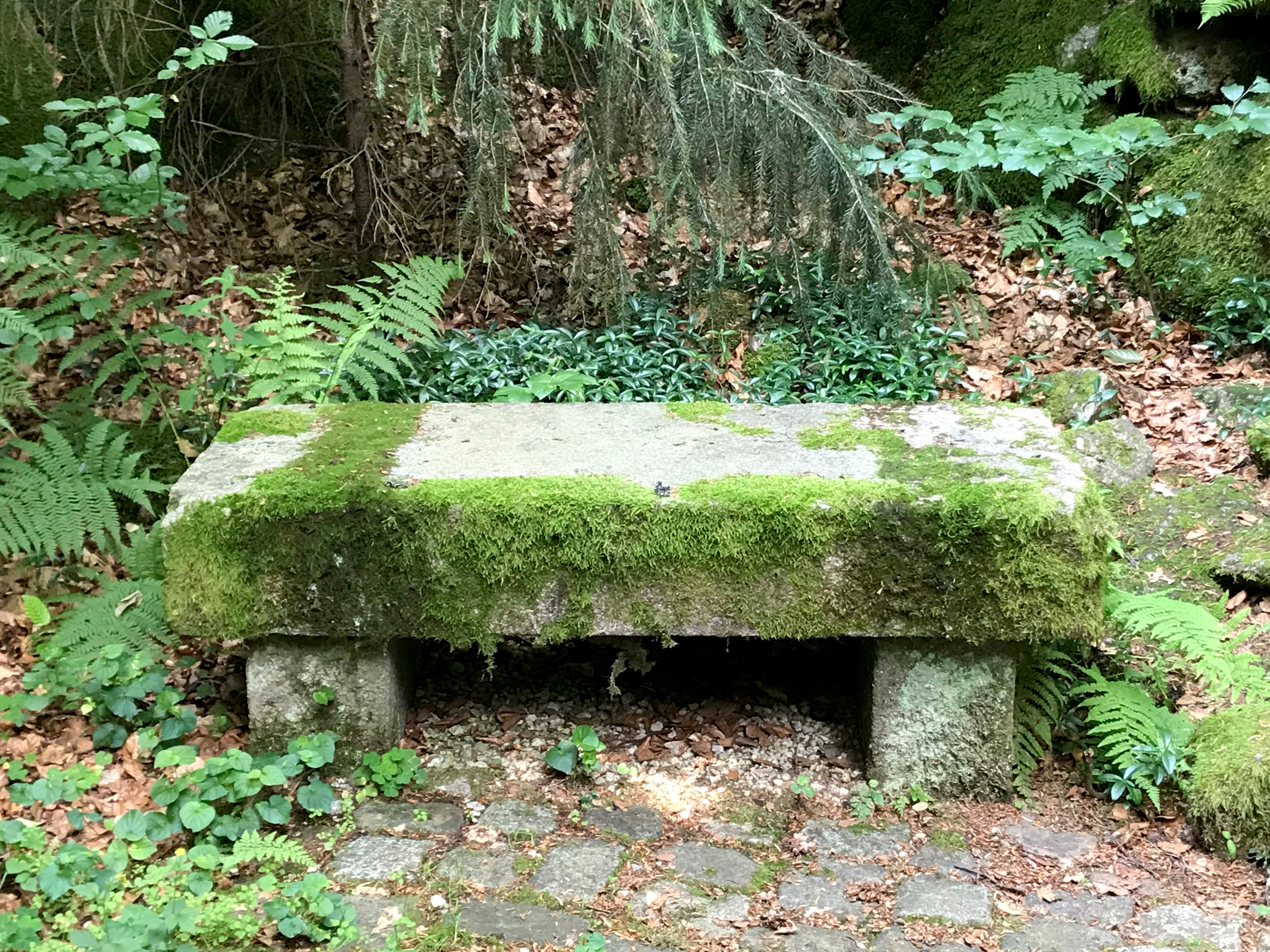 Boční lavička na Lesní pobožnosti v lázeňských lesích v Karlových Varech